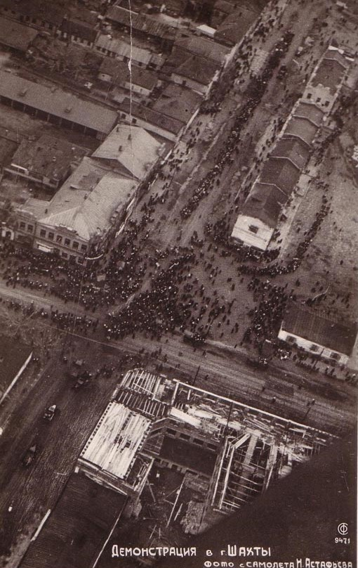 Демонстрация в городе Шахты: фотография с самолета